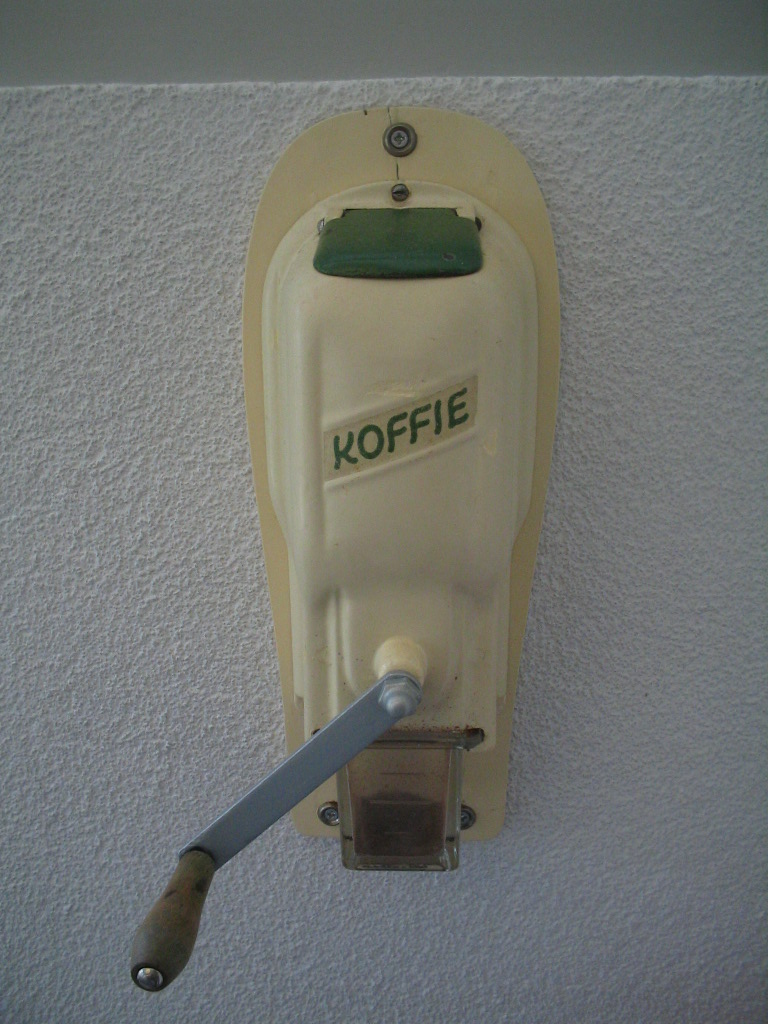 koffiemolen, gefotografeerd bij mijn ouders, 7 aug 2005